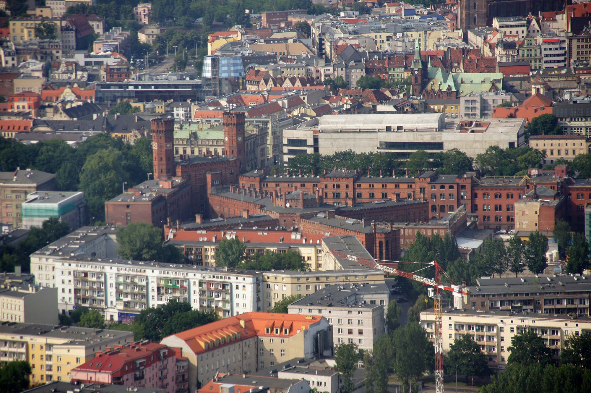 Panorama Wrocławia z wieży Sky Tower